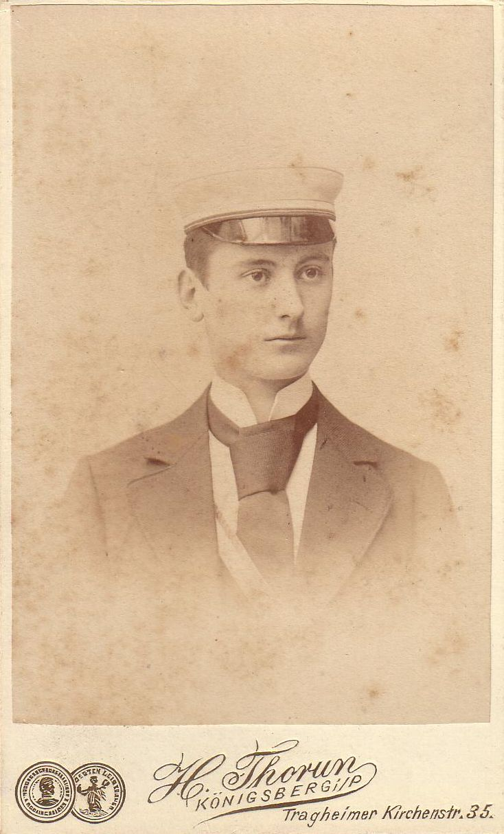 Fotografie von Paul Treibe (1876-1956)